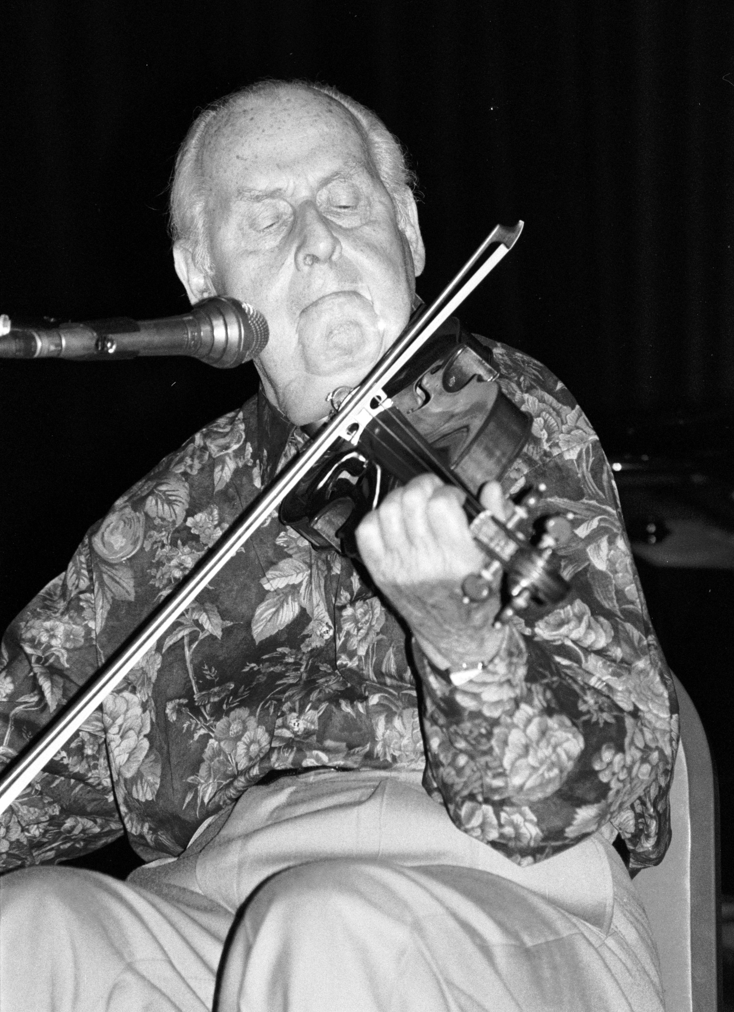 Le violoniste de jazz Stéphane Grappelli en concert à Deauville (Calvados, France).